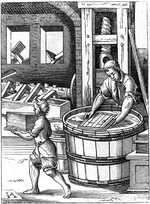 Le papetier au XVIe siècle Gravure de Paul Lacroix, in Histoire de l'imprimerie, issue du site Textes rares.